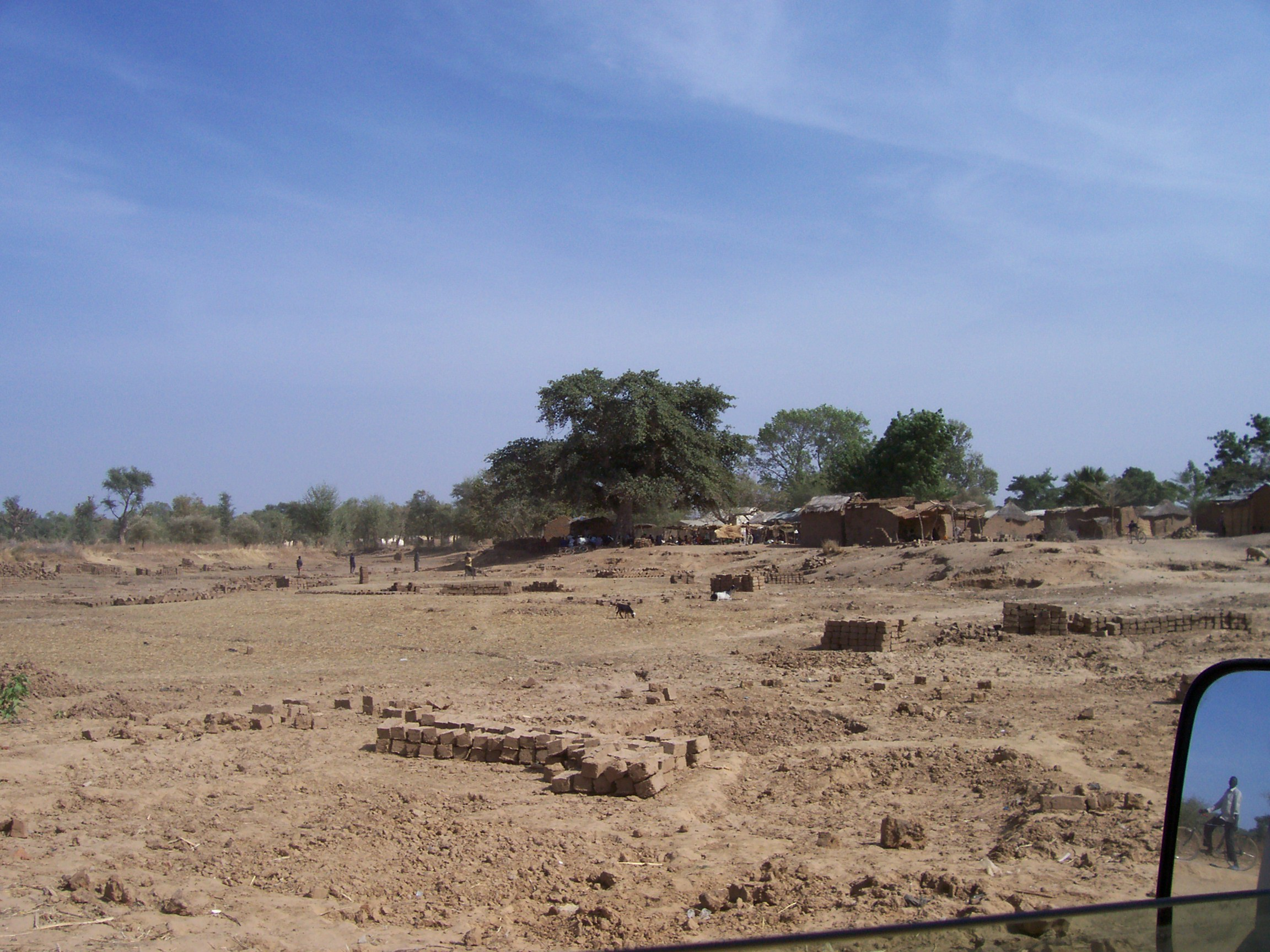 Foto personale gennaio 2005, Mattoni cotti d'edilizia rurale in Ciad del sud